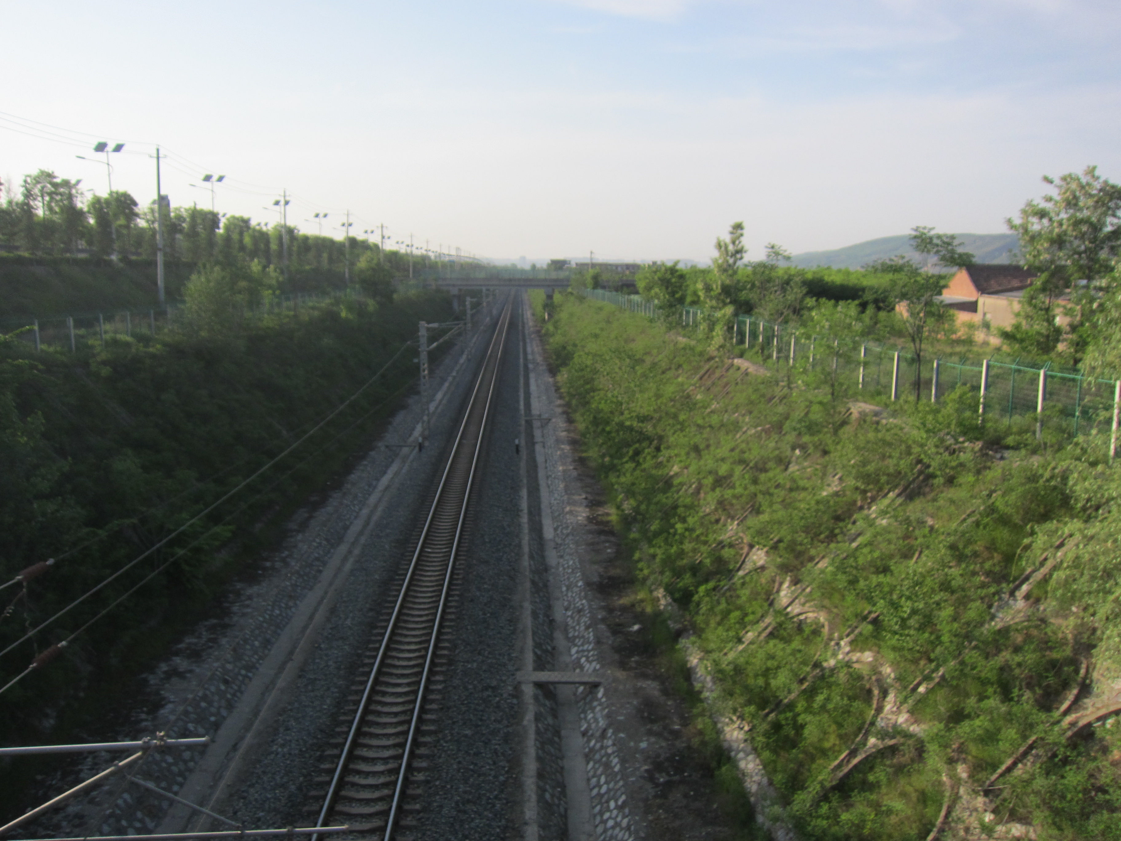 西安长安安哑路望西康铁路